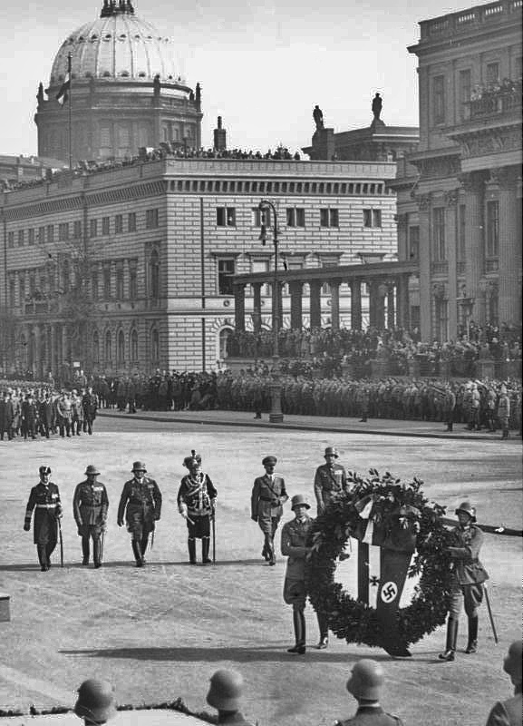 “Die große Heldengedenkfeier in Berlin Angesichts der historischen Entschließung des Führers, dem deutschen Volk die allgemeine Wehrpflicht wieder zu geben, gestaltete sich die Heldengedenkfeier in Berlin zu einem Ereignis von ganz besonderer Bedeutung. Zehntausende grüßten unter den Linden, Zehntausende auf dem Schloßplatz in unbeschreiblicher Begeisterung den Führer der Deutschen und die deutsche Wehrmacht. Und diese Begeisterung war an diesem Tage und in dieser Stunde mehr als das, sie war ein Schwur der Gefolgschaft für den Führer. Bild zeigt, wie der große Kranz der deutschen Wehrmacht in das Ehrenmal "Unter den Linden" getragen wird. Dahinter von links Admiral Raeder, General v. Fritsch, General Göring, Feldmarschall von Mackensen, der Führer und Generaloberst v. Blomberg.”